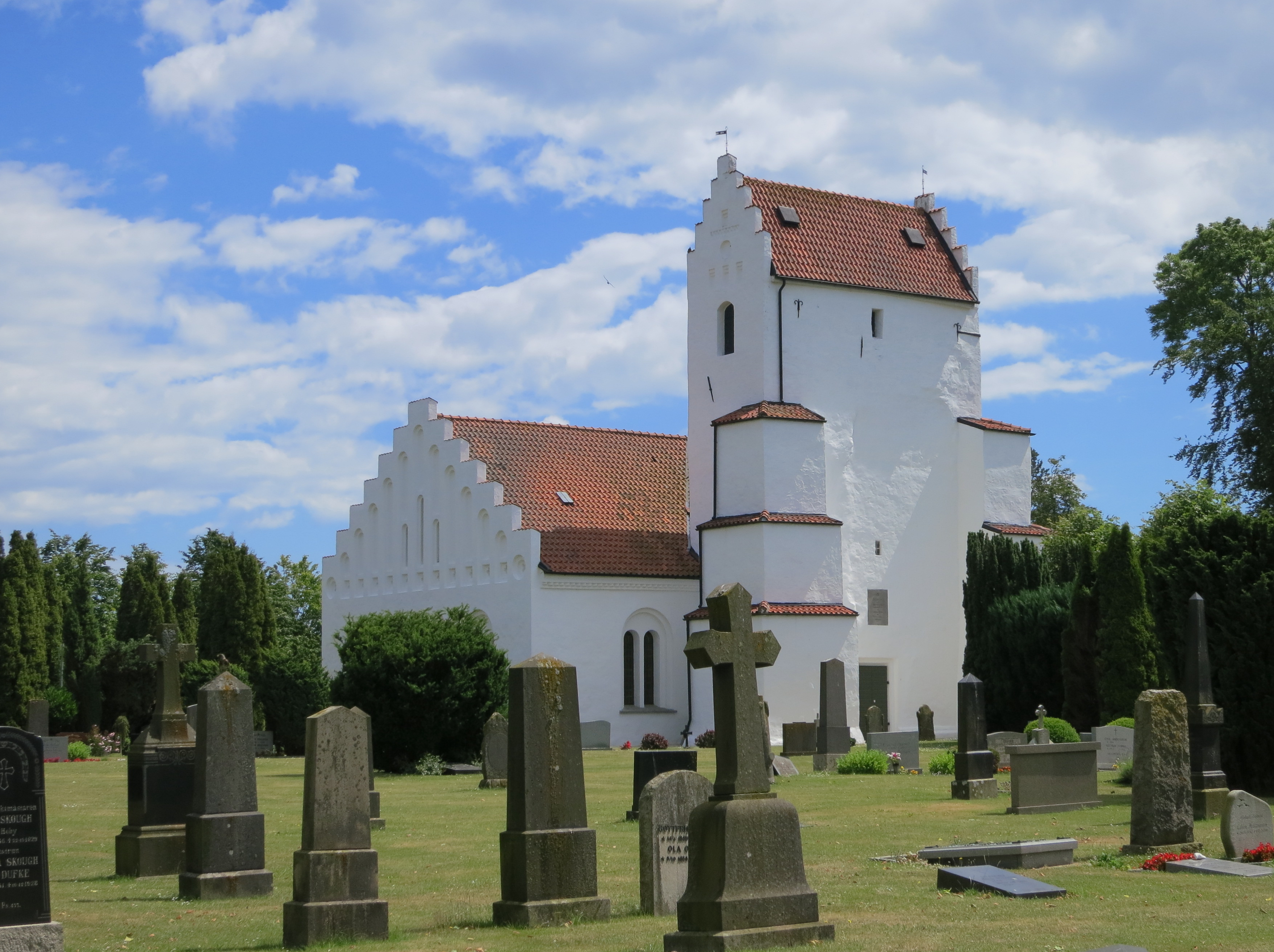 Östra Hoby kyrka i juni 2014